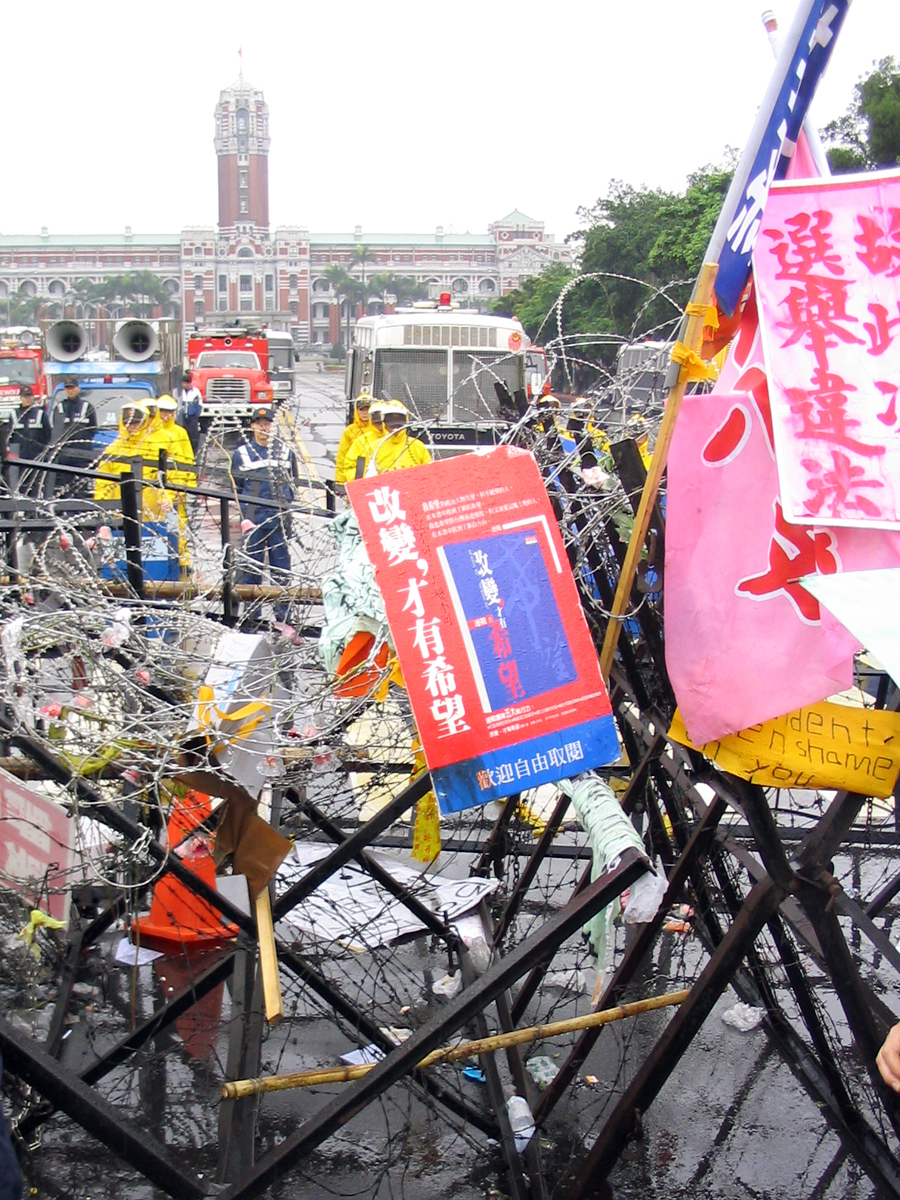 2004年台灣320抗議活動下，被重重警戒保護的總統府 採訪時順便拍攝。 以Canon G1攝於2004年3月26日上午，中華民國總統府前。 Richy 16:52 2004年8月19日 (UTC)